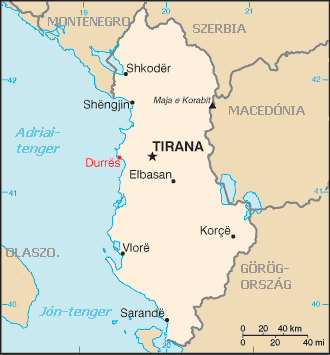 CIA World Factbook alapján készült közkincs kép magyarí­tása